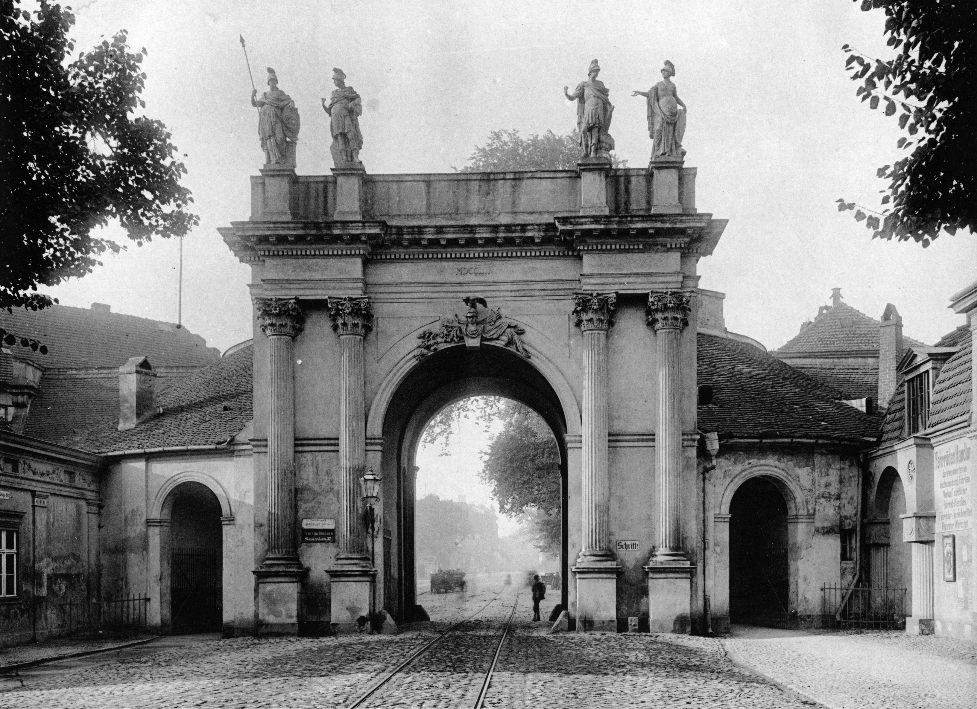 Potsdam, Berliner Tor um 1896